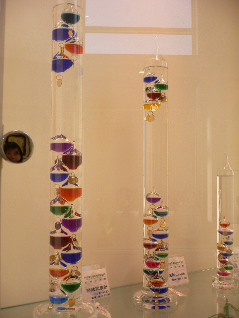 伽利略浮球溫度計